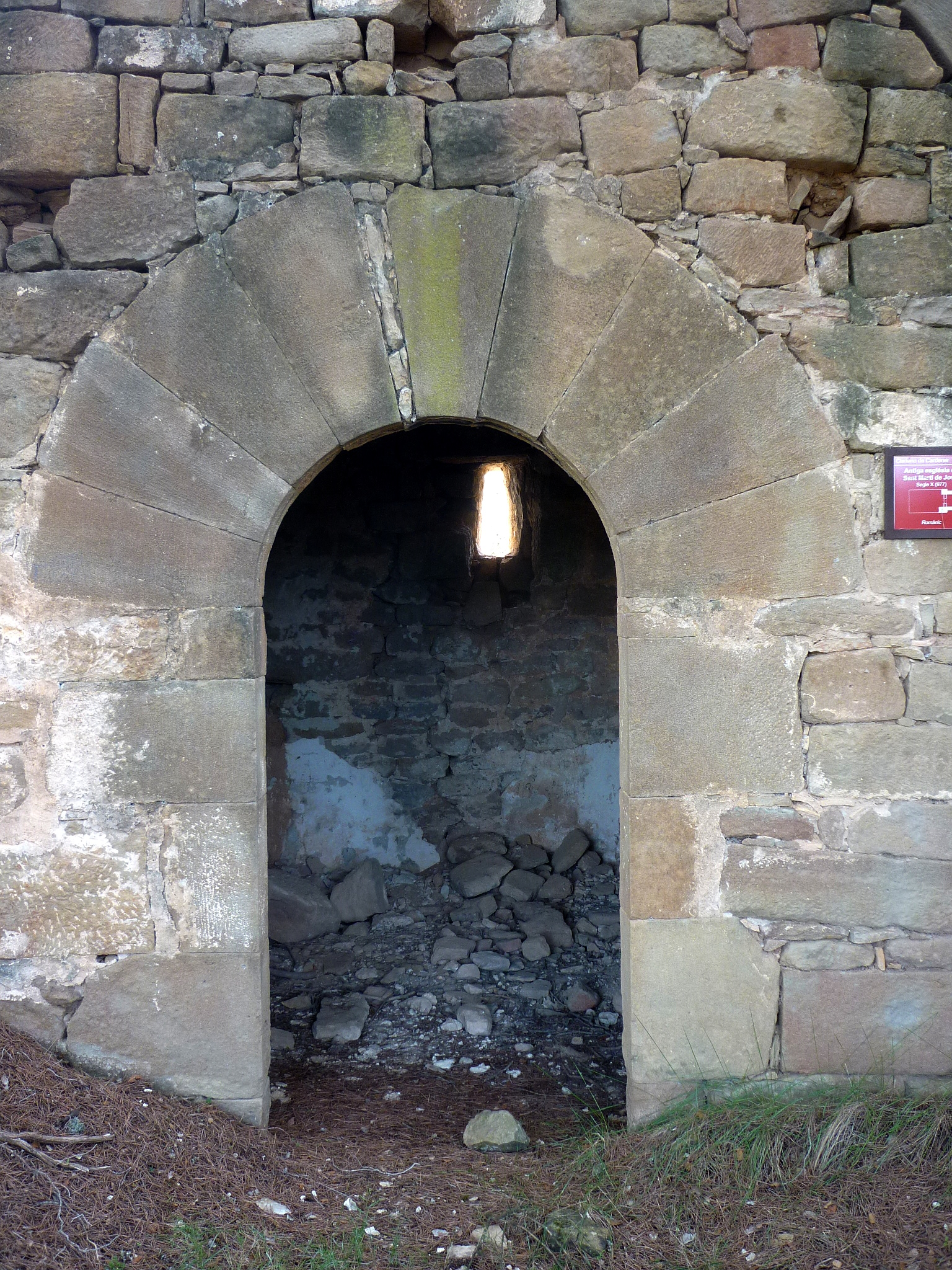 Antiga església de Sant Martí de Joval (Clariana de Cardener): portada